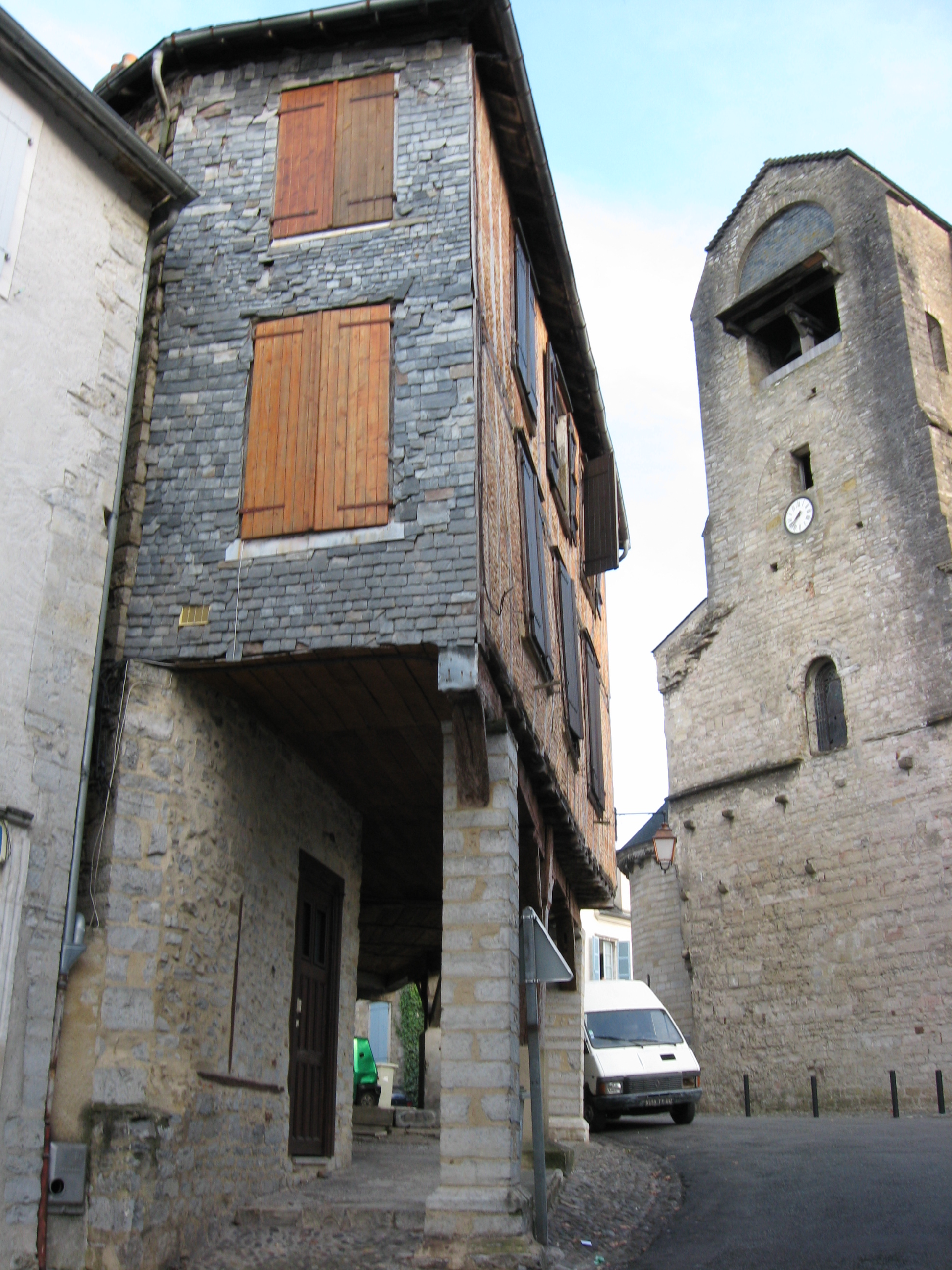 Maison à colombages et partie de l'église romane au quartier Sainte Croix (Oloron-Sainte-Marie (Pyrénées Atlantiques) Pyrénées).